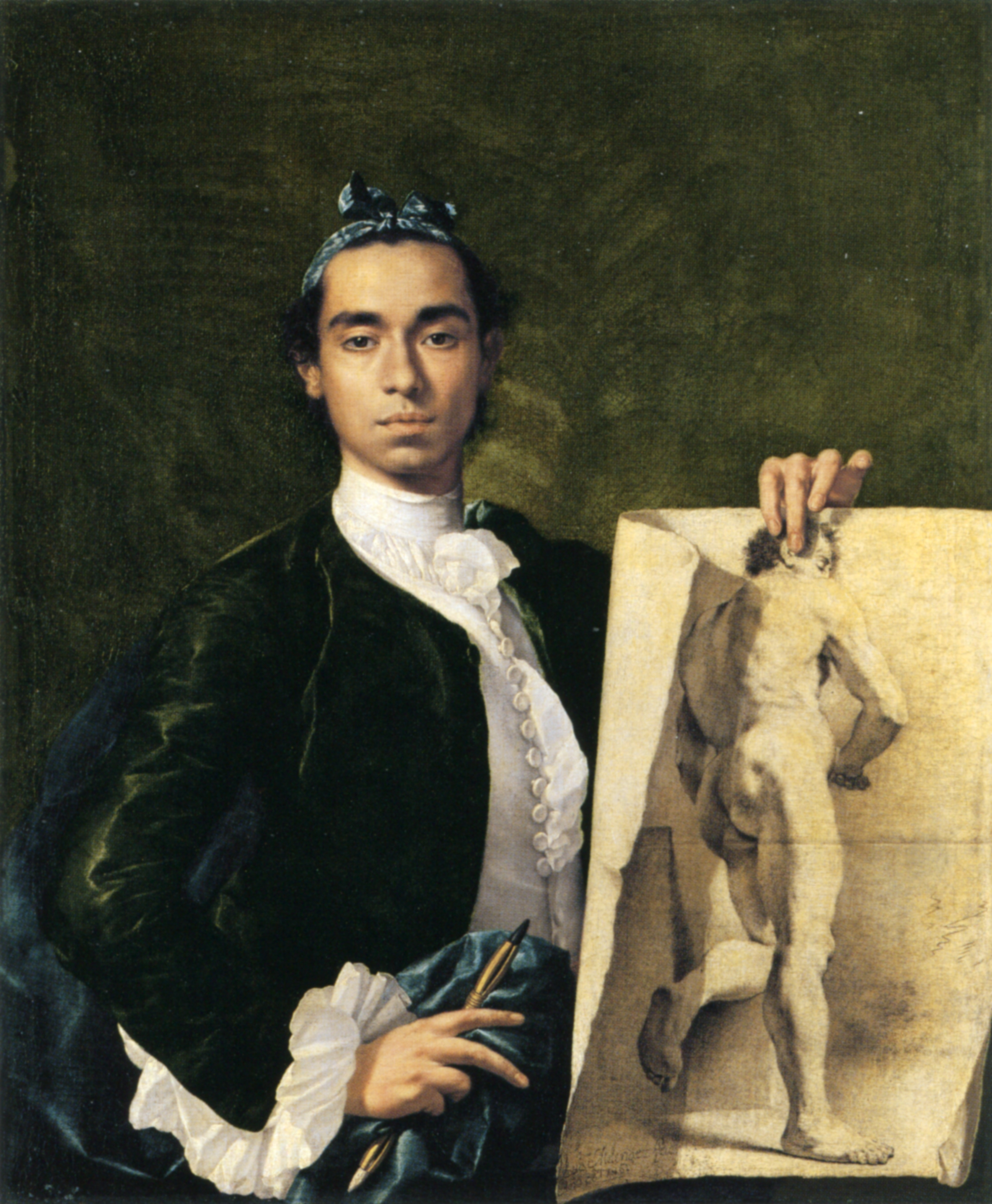 Cet autoportrait fut peint en 1746, un an après que l'artiste eut reçu un premier prix de l'Académie de San Fernando alors en train de se créer. Contraint de quitter l'Académie après une querelle, Meléndez se consacra dès lors essentiellement à la nature morte.